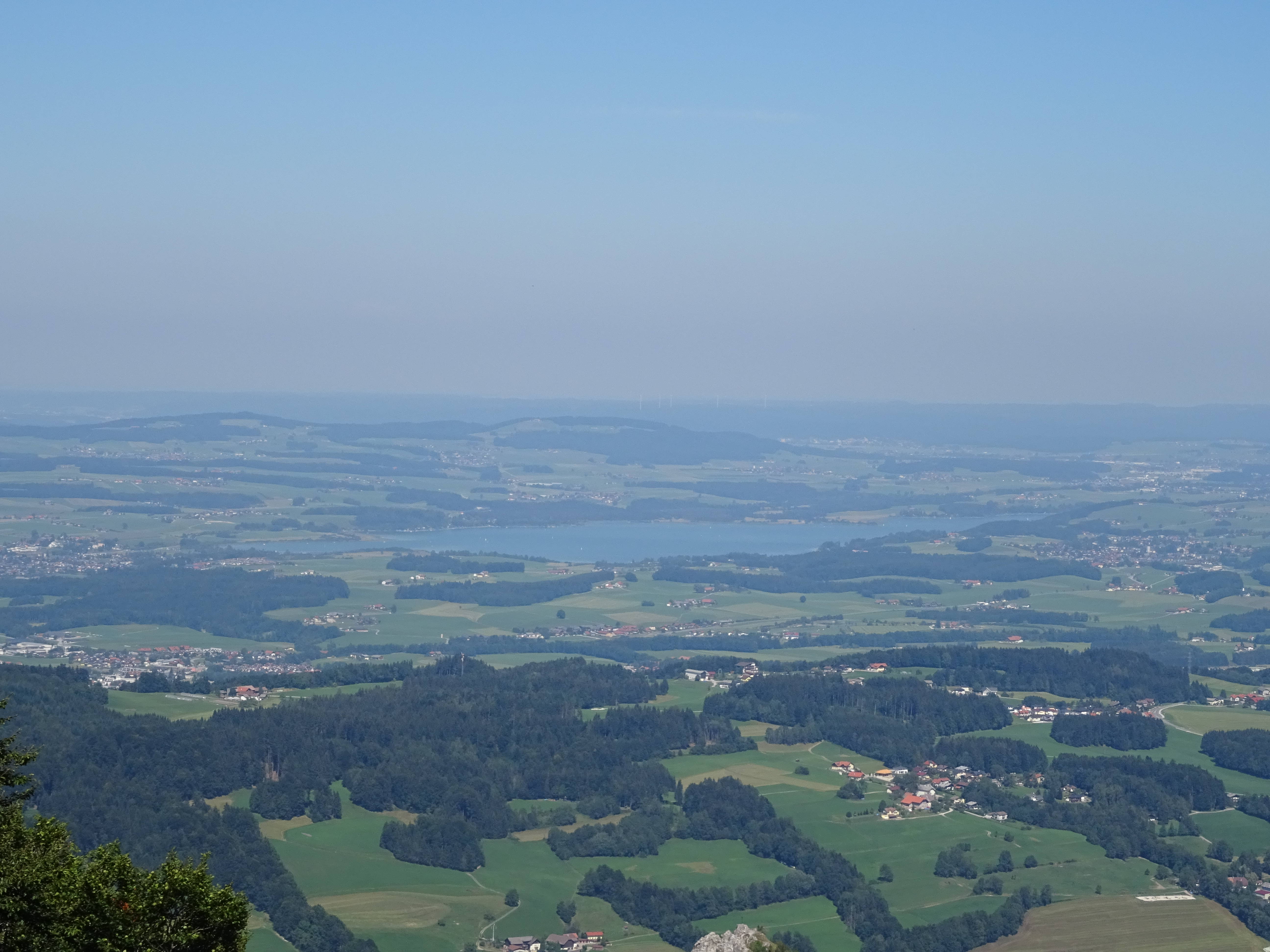 Ausblick vom Gaisberggipfel in Richtung Nord. Zu sehen ist der Wallersee.